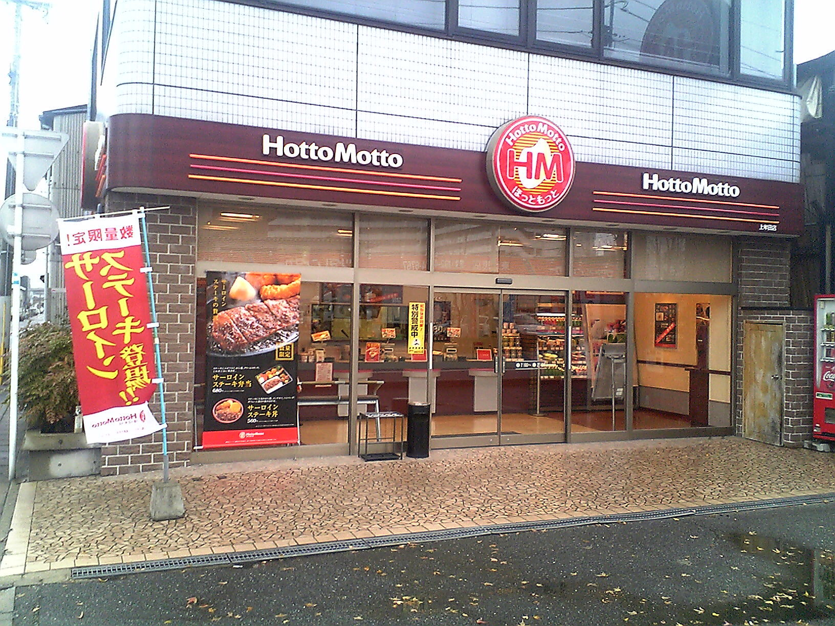 福岡市博多区にあるほっともっと上牟田店。プレナス本社の近くに立地する。